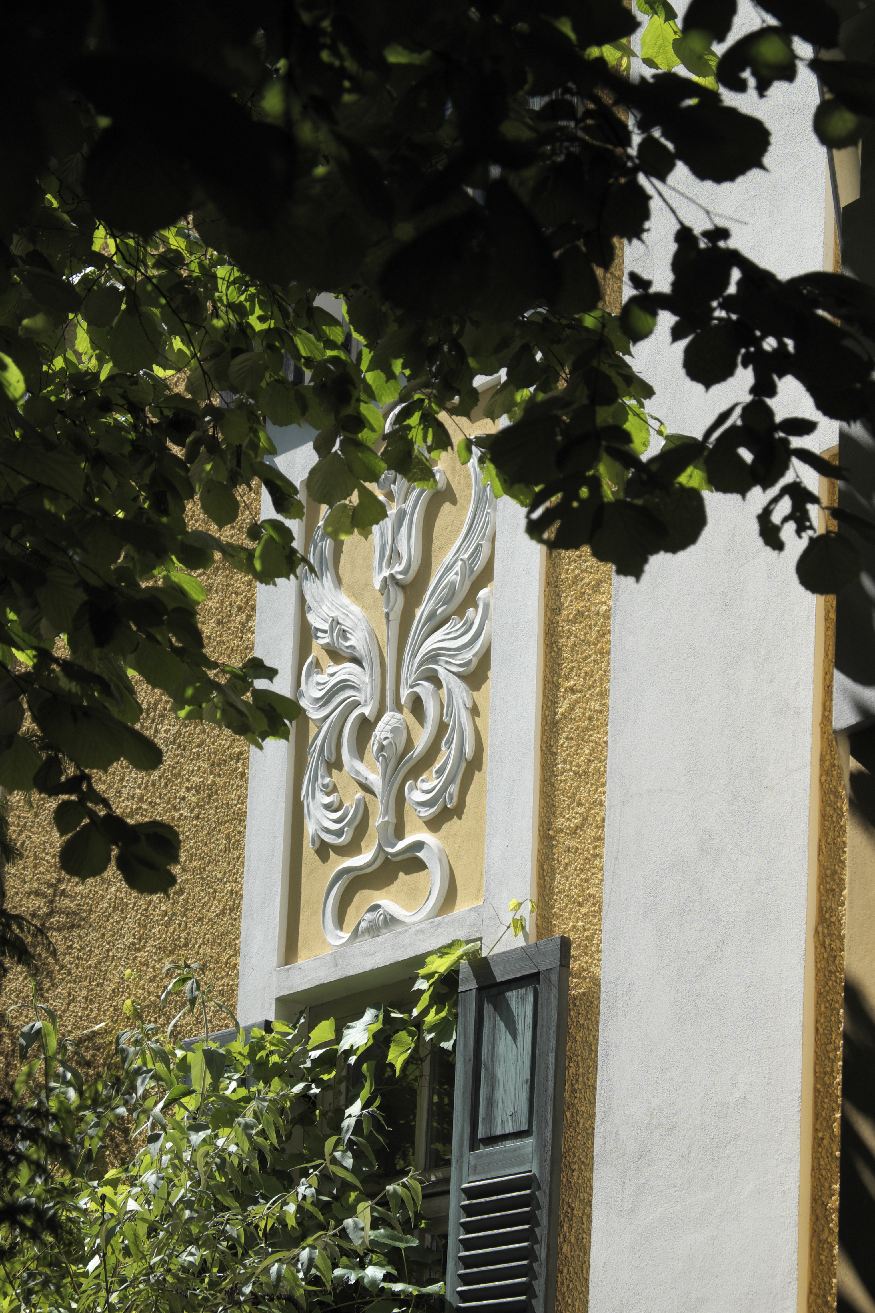 Villa in der Hofmillerstraße 32 in Obermenzing im Stadtbezirk Pasing-Obermenzing in München (Bayern/Deutschland), Stuckdekor an der Fassade